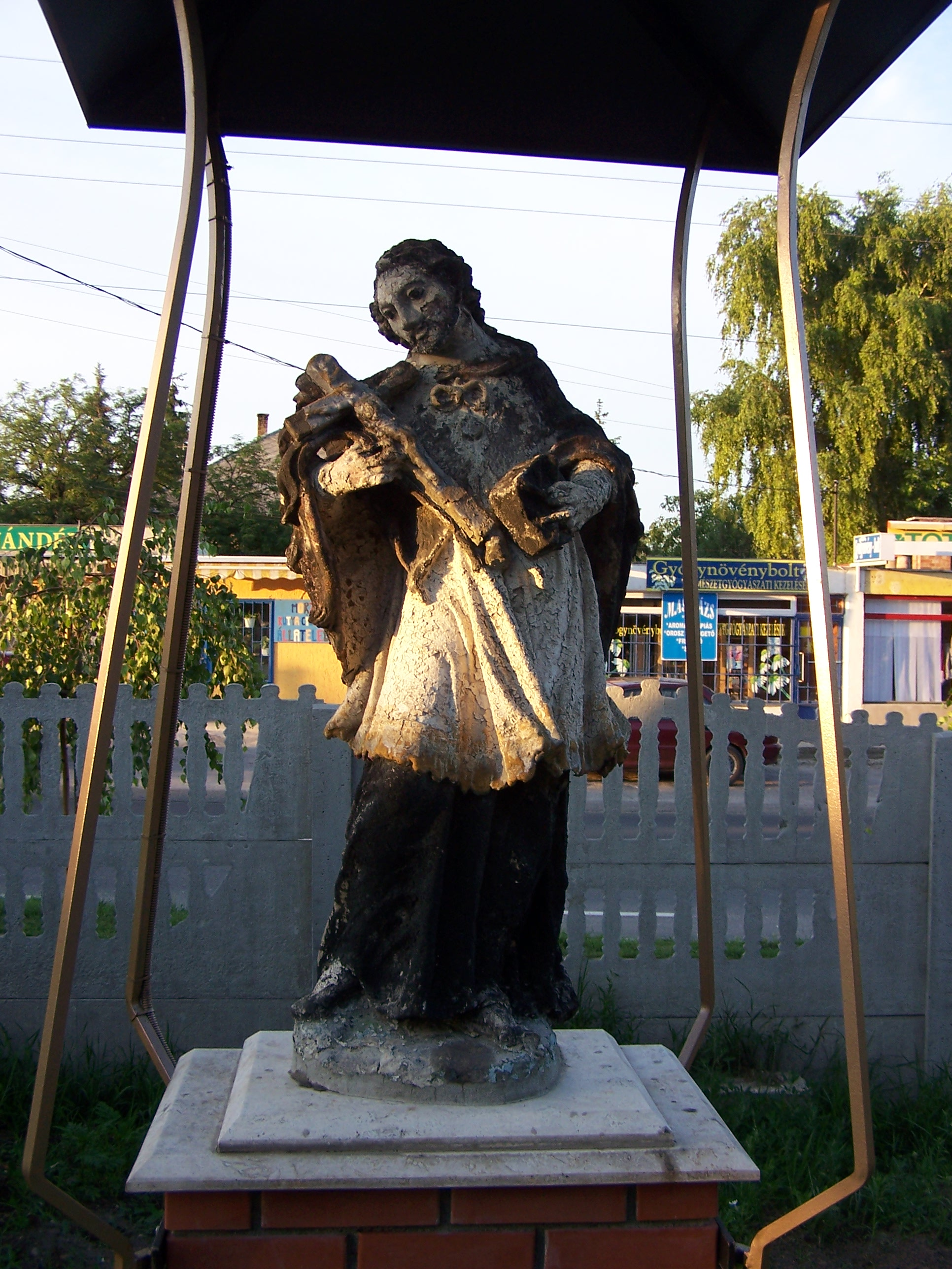 Nepomuki Szent János-szobor. Barokk, 18. sz. azonosító: 7093, törzsszám: 7069 ( Pest megye, Kerepes, Mogyoródi út. Temető) This is a photo of a monument in Hungary. Identifier: 7093